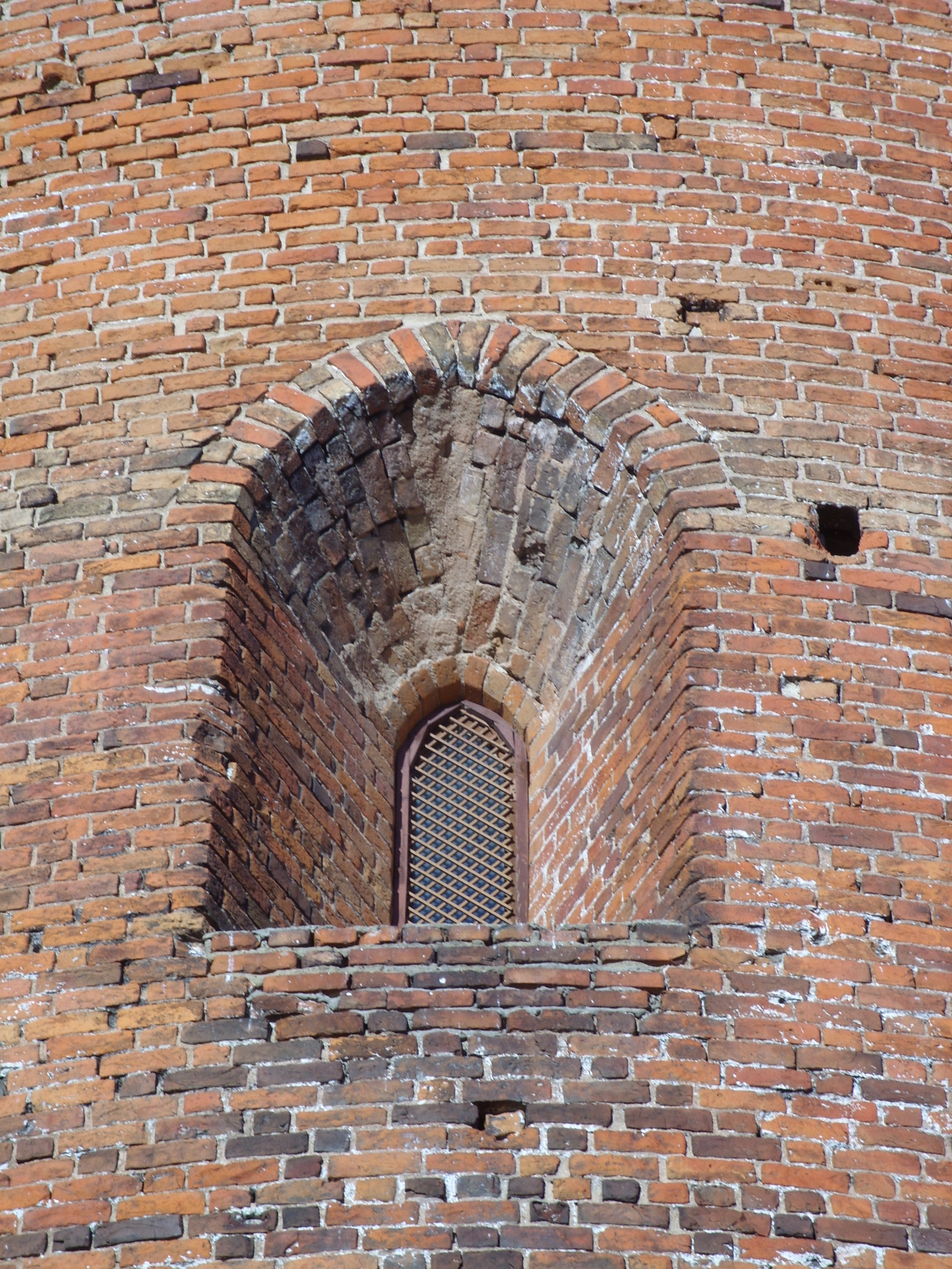 Байніца